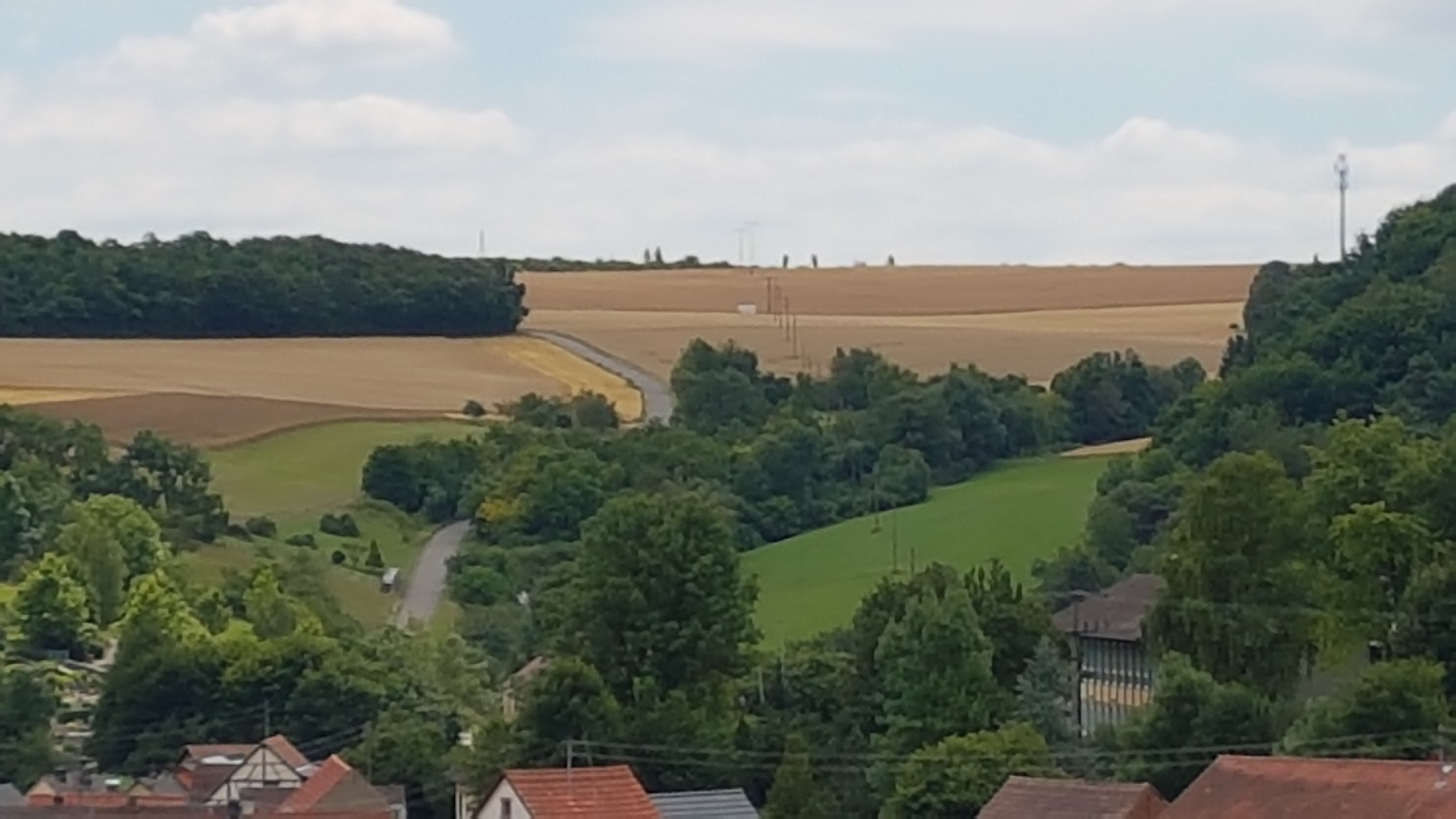 Blick auf den Steigegraben im Hintergrund, der Ort Dittwar im Vordergrund. Rechts am Berg die Laurentiushalle.